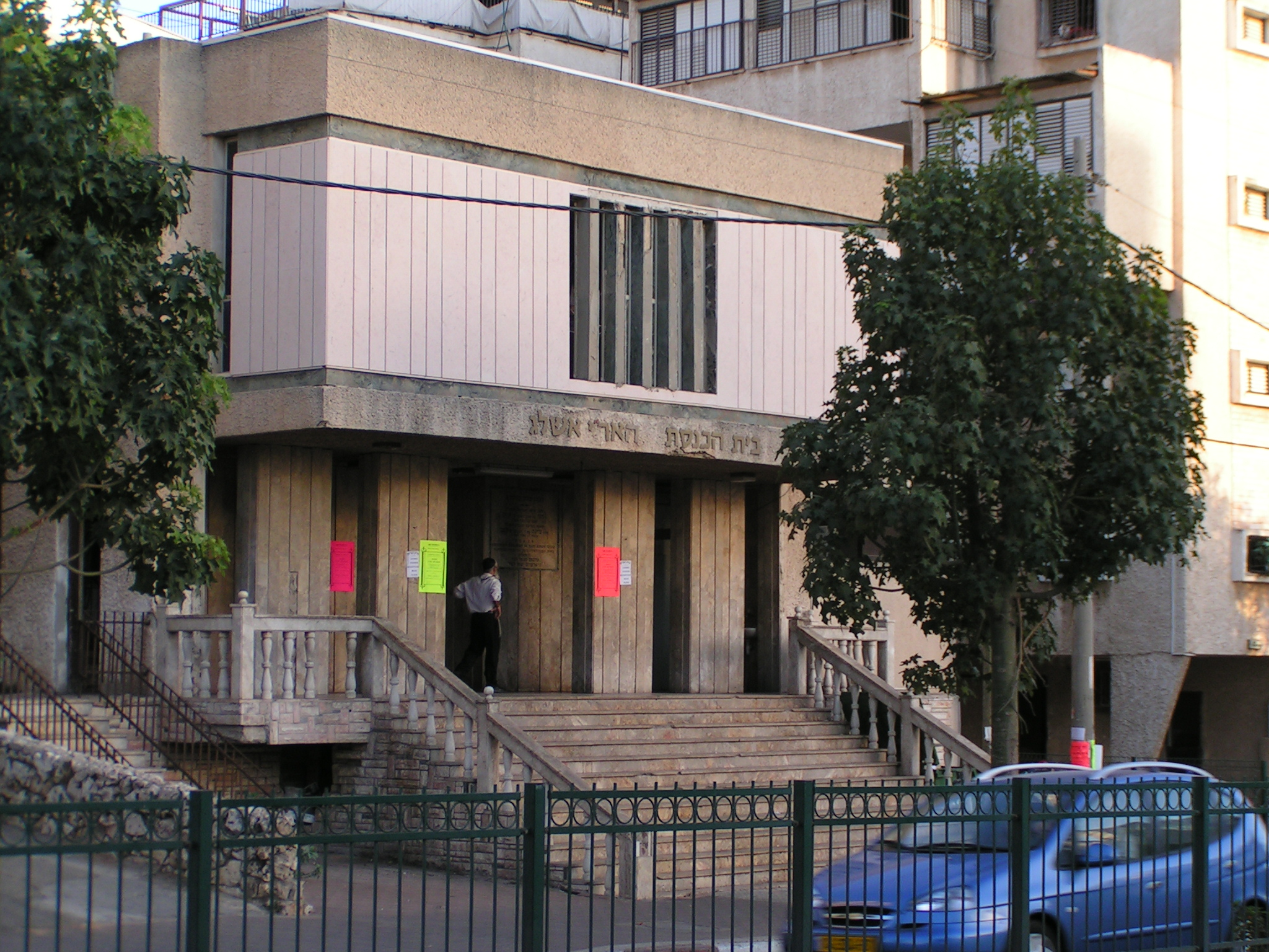 צילום של בית הכנסת "האר"י אשלג" בבני ברק.